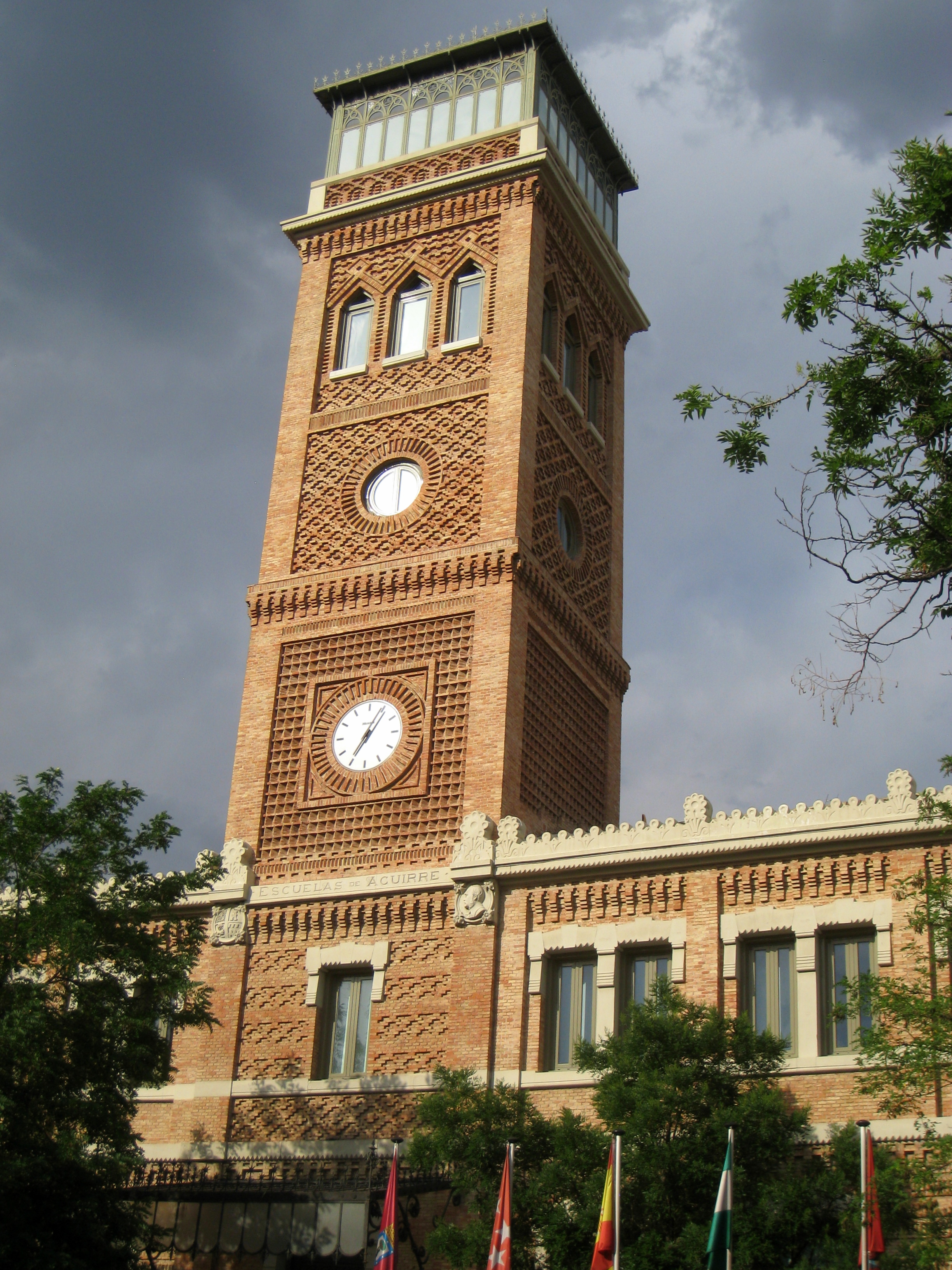 Casa Árabe, Calle Alcalá 62, Madrid, Spain.